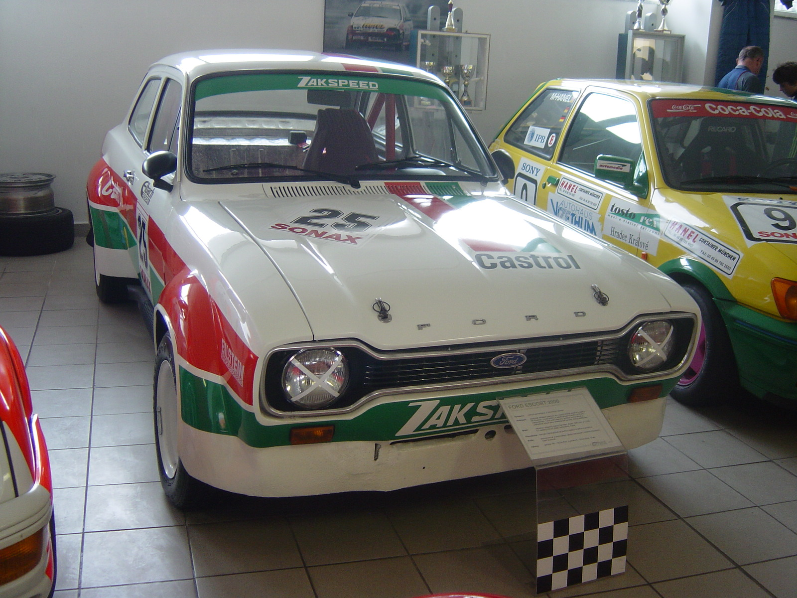 Ford Escort 2000